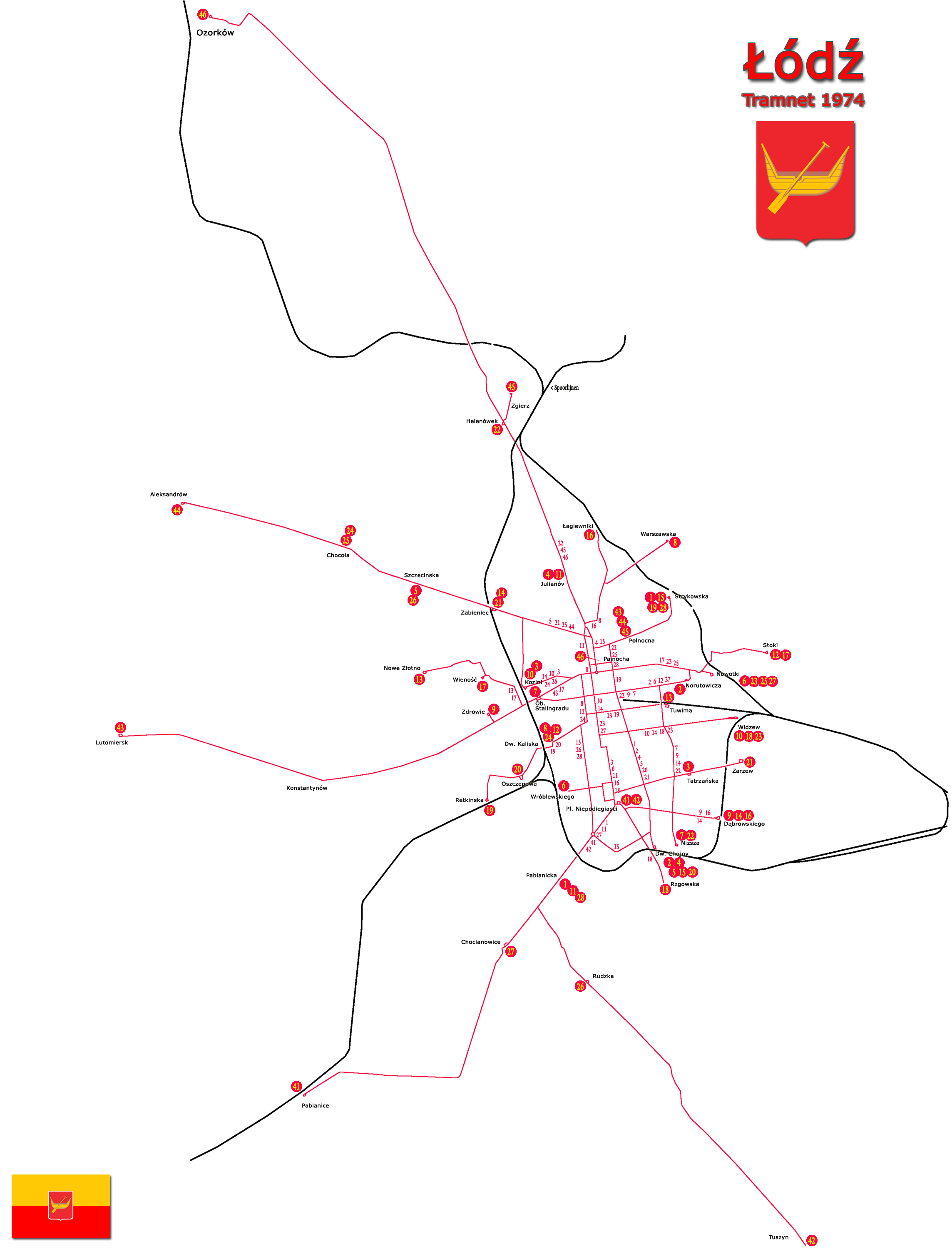 Kaart tramnet Lodz in 1974